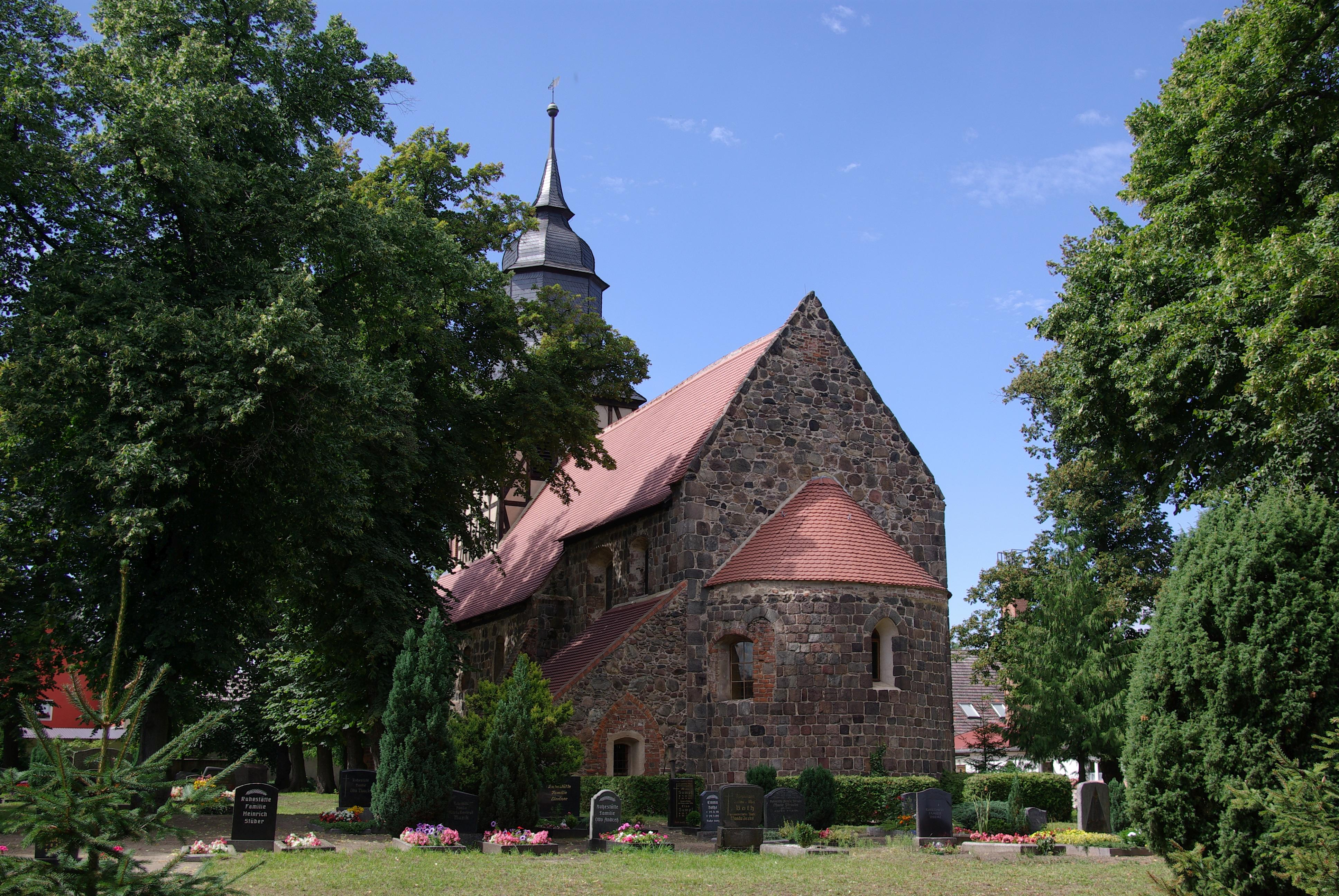 Jüterbog-Neumarkt in Brandenburg. Die St. Jacobi Kirche befindet sich am Tanzberg und steht unter Denkmalschutz.